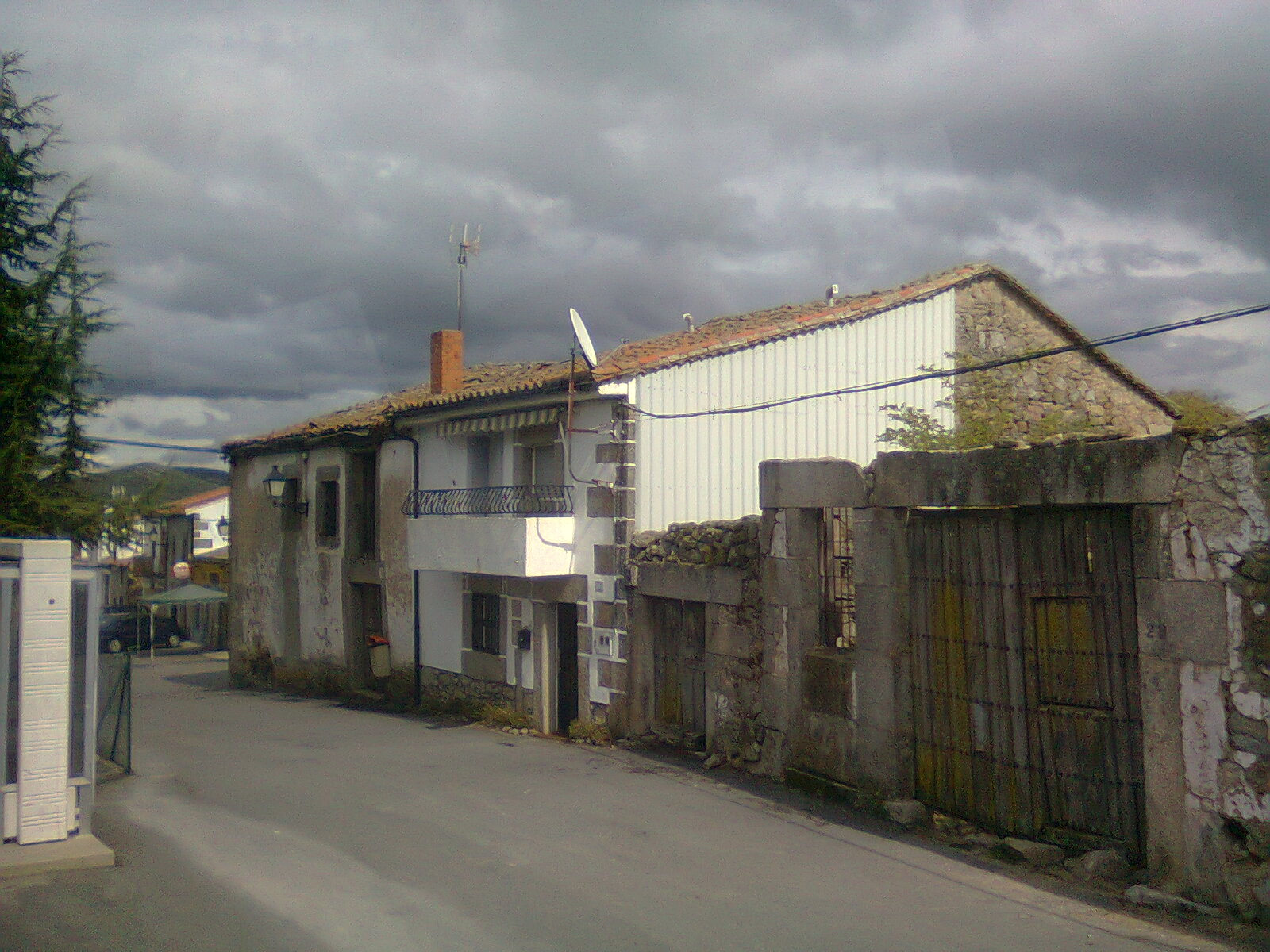 Calle Pocillo de Nava de Béjar